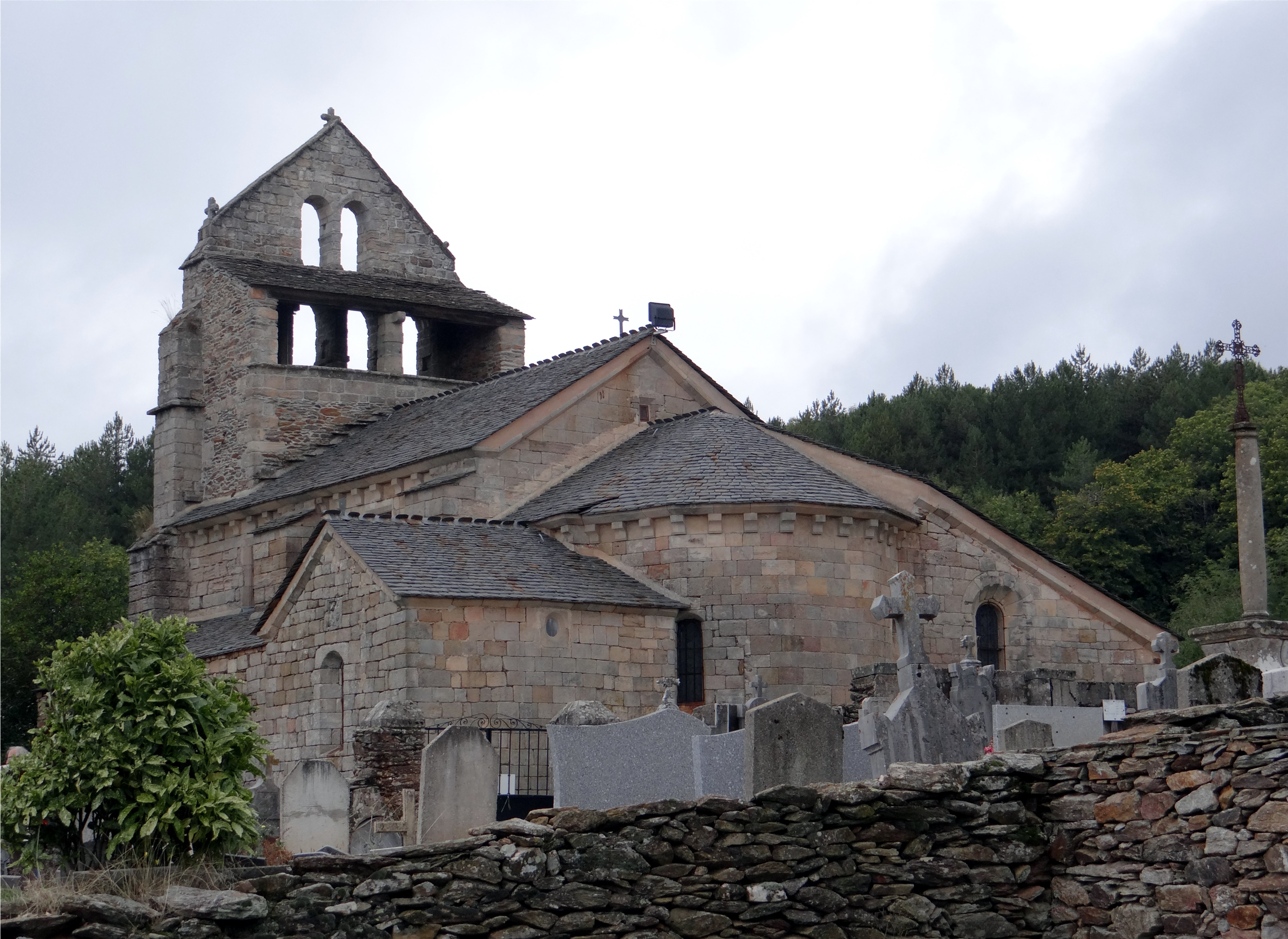 Église de Saint-André-Lachamp, Ardèche, France